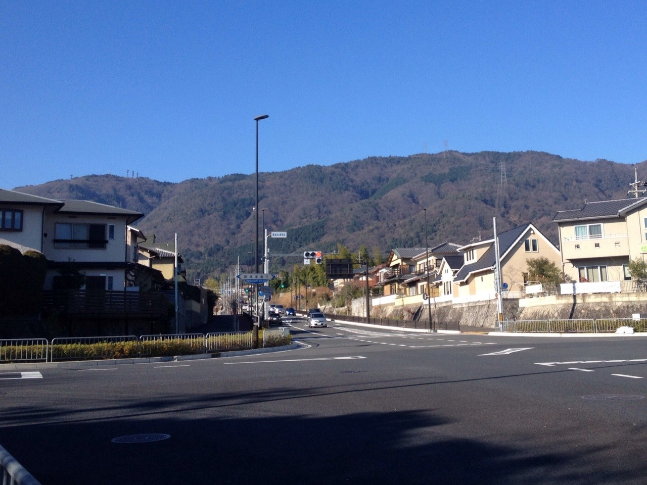 新林本通境谷交差点から見た小塩山